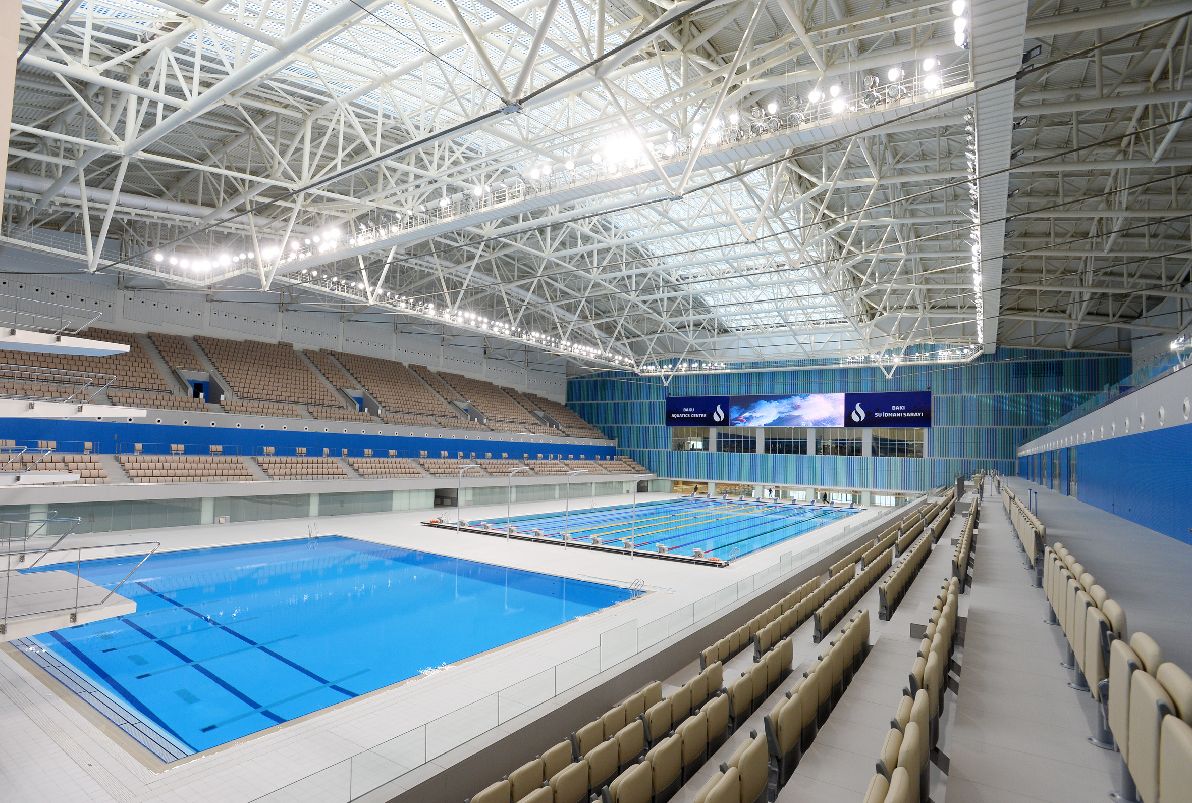 Baku Aquatics Centre